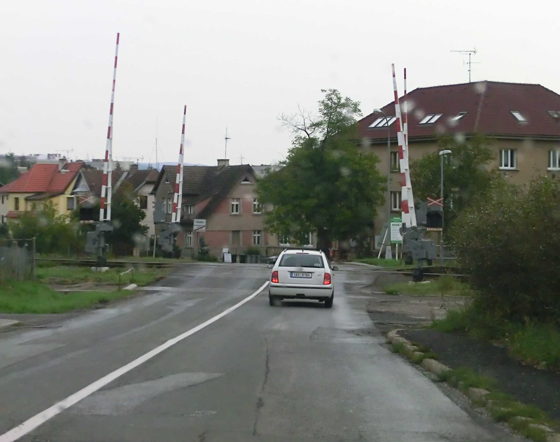 Železniční přejezd v Jičíně - Sedličkách.